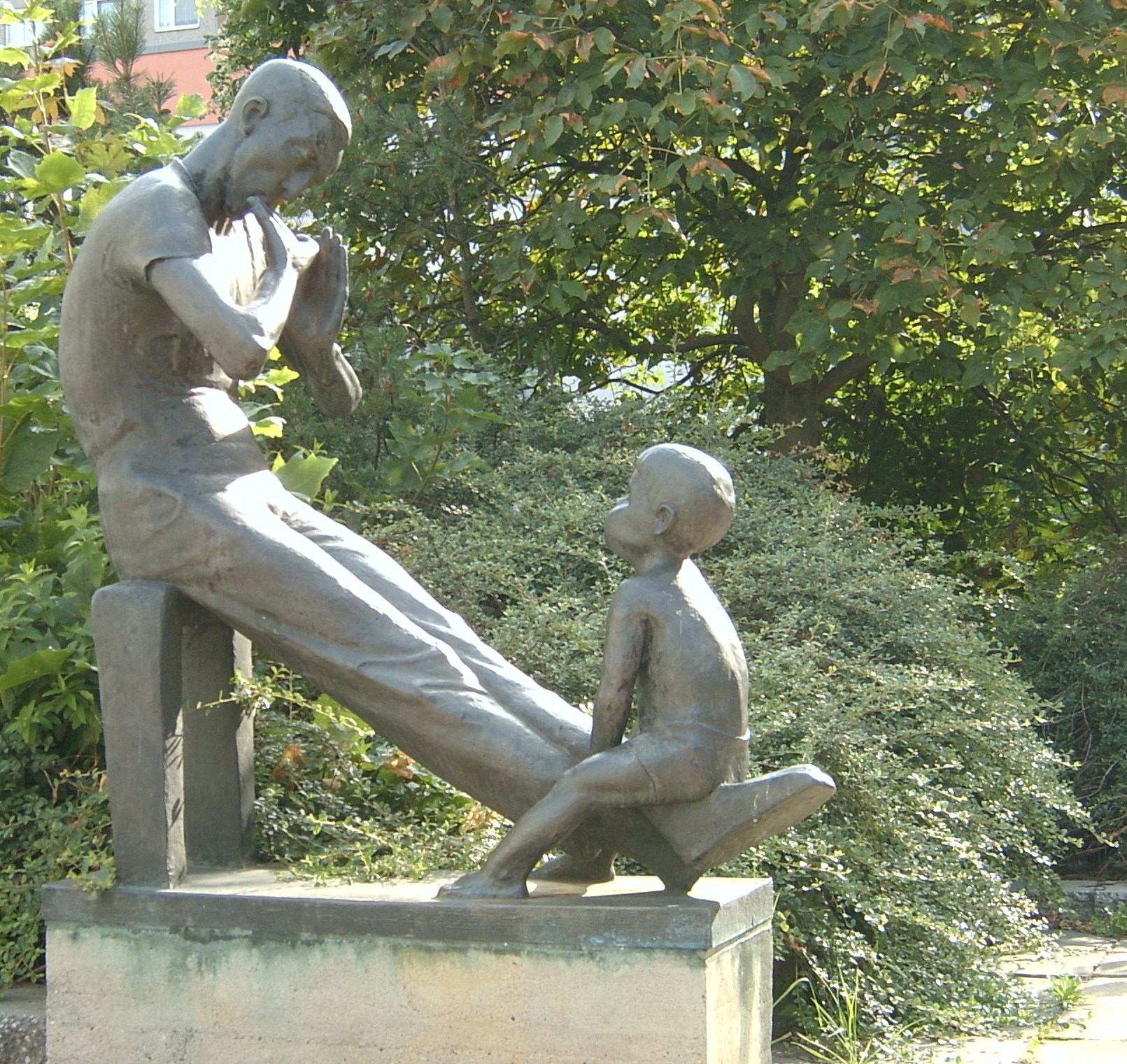 Vater und Sohn oder auch Mundharmonikaspieler - eine Plastik in Frankfurt (Oder) in der Franz-Mehring-Straße.